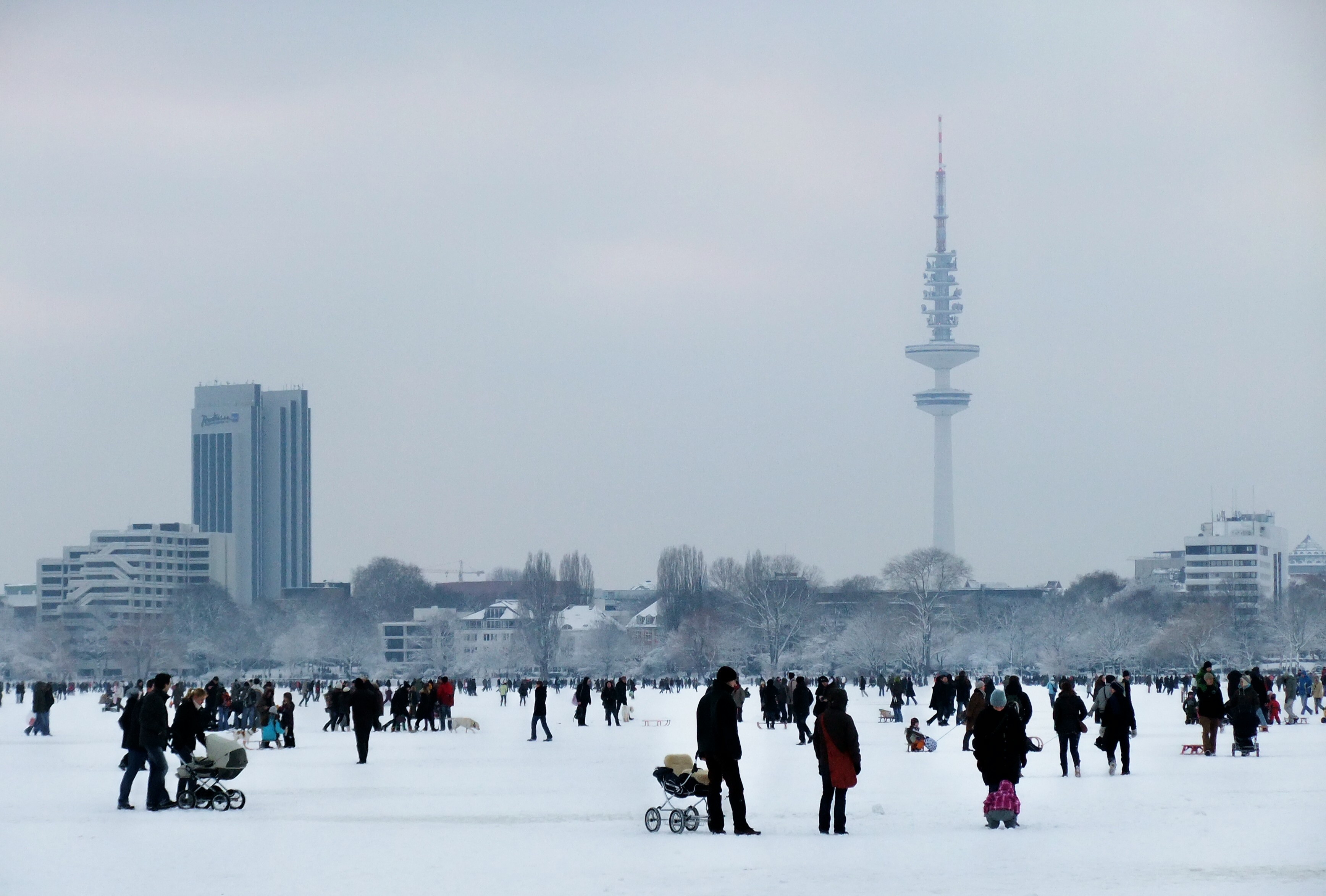 Alstereisvergnügen auf der Hamburger Außenalster, Januar 2010